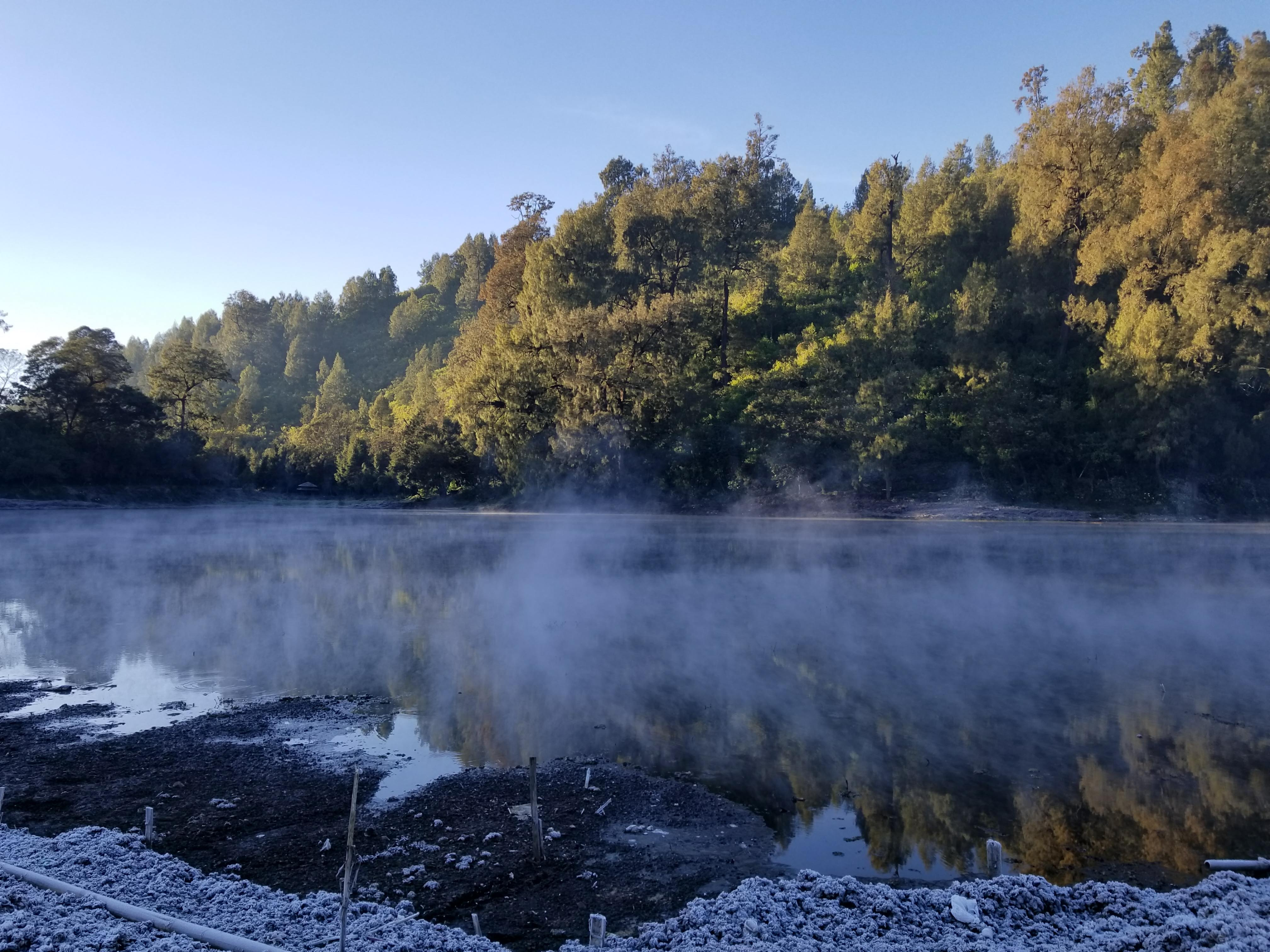 Salju di Ranu Pani 4 Agustus 2018 by Susanto Tan 2